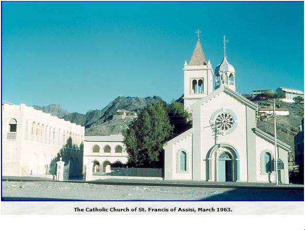 كنيسة في عدن